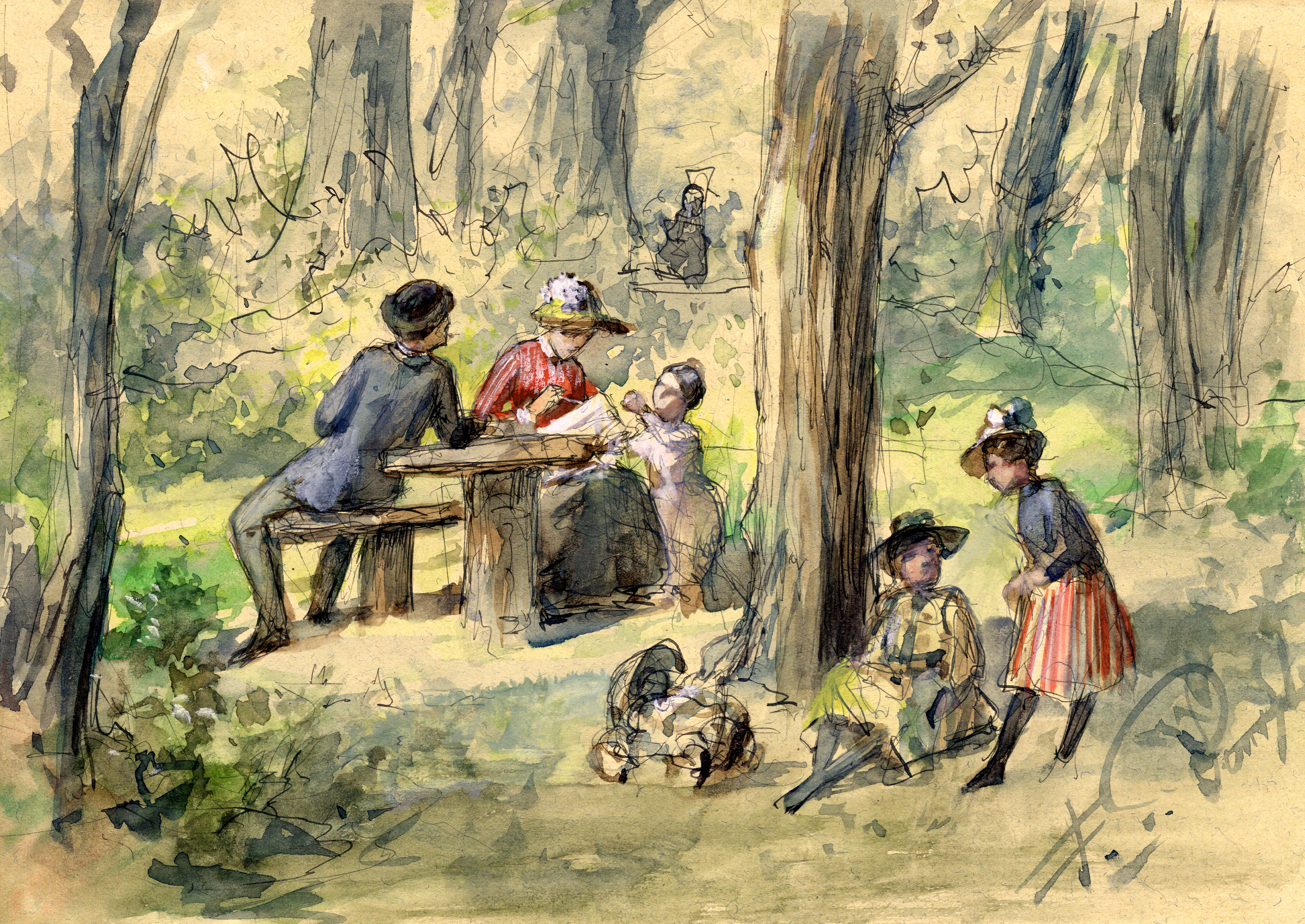 sketch, Franz von Persoglia Vienna